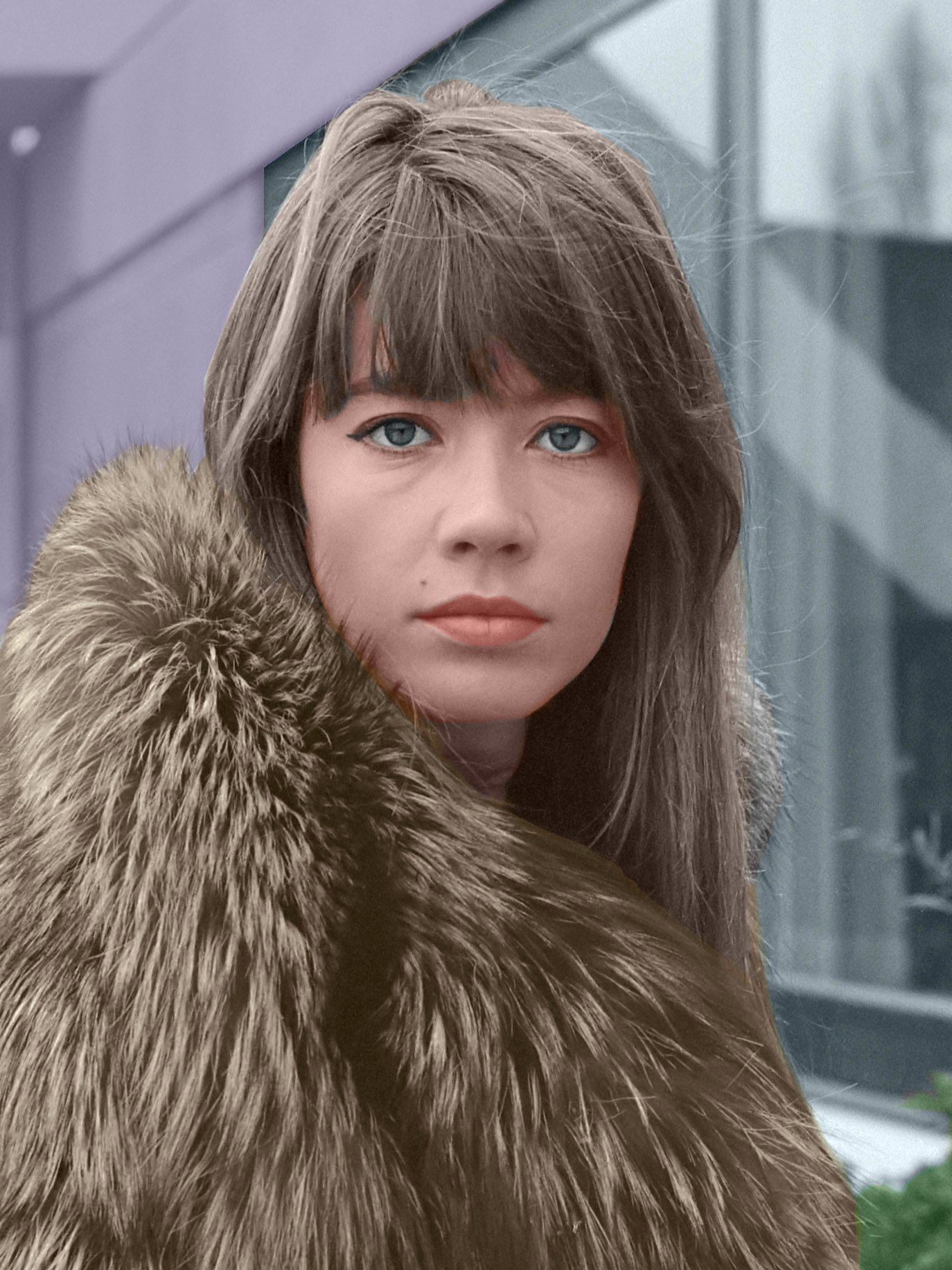 Françoise Hardy en 1969 (photo colorisée)